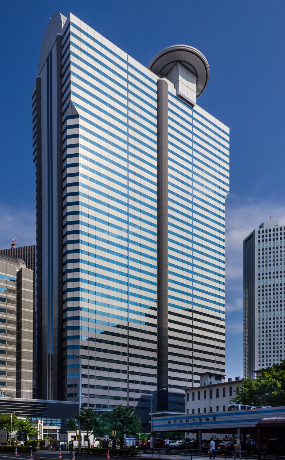 新宿アイランドタワー（東京都新宿区）